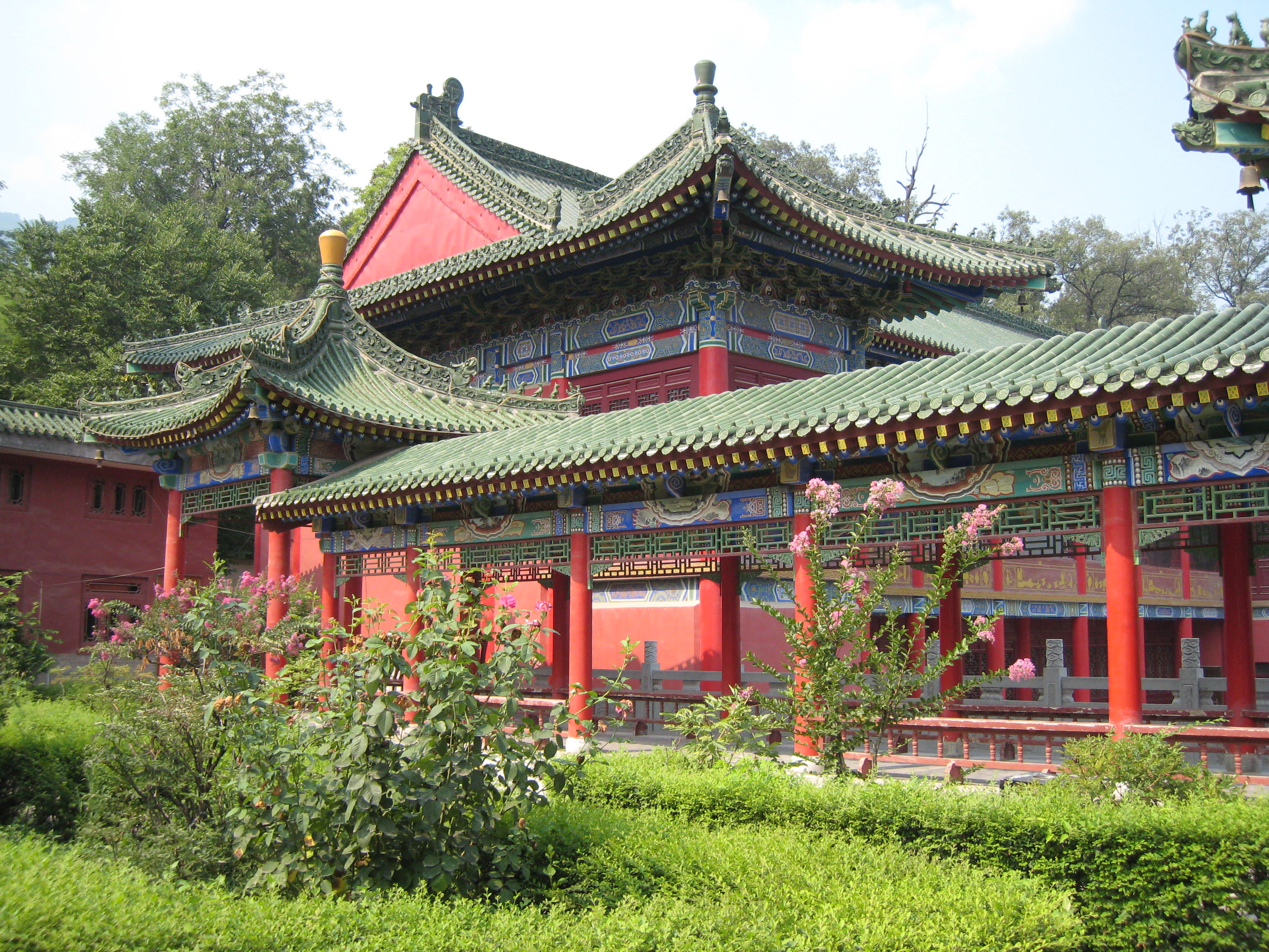 Anlage des Louguantai-Tempels